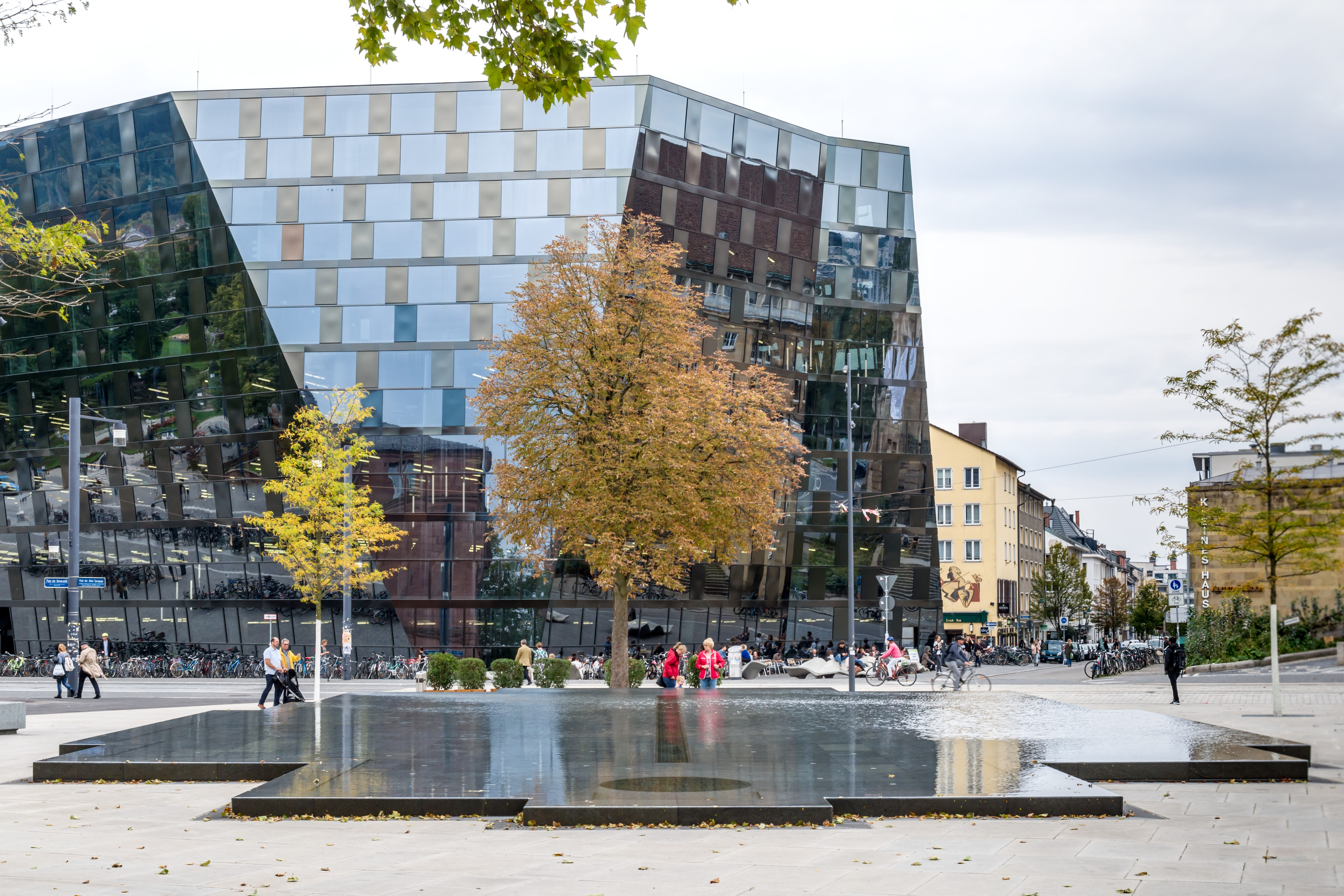 Bilder aus Freiburg im Breisgau. Hier Platz der Alten Synagoge